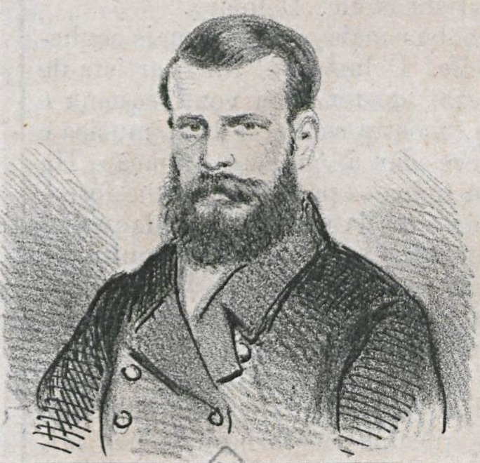 O 1º tenente Álvaro Augusto de Carvalho, Comandante do vapor Ipiranga, morto na Guerra do Paraguai.